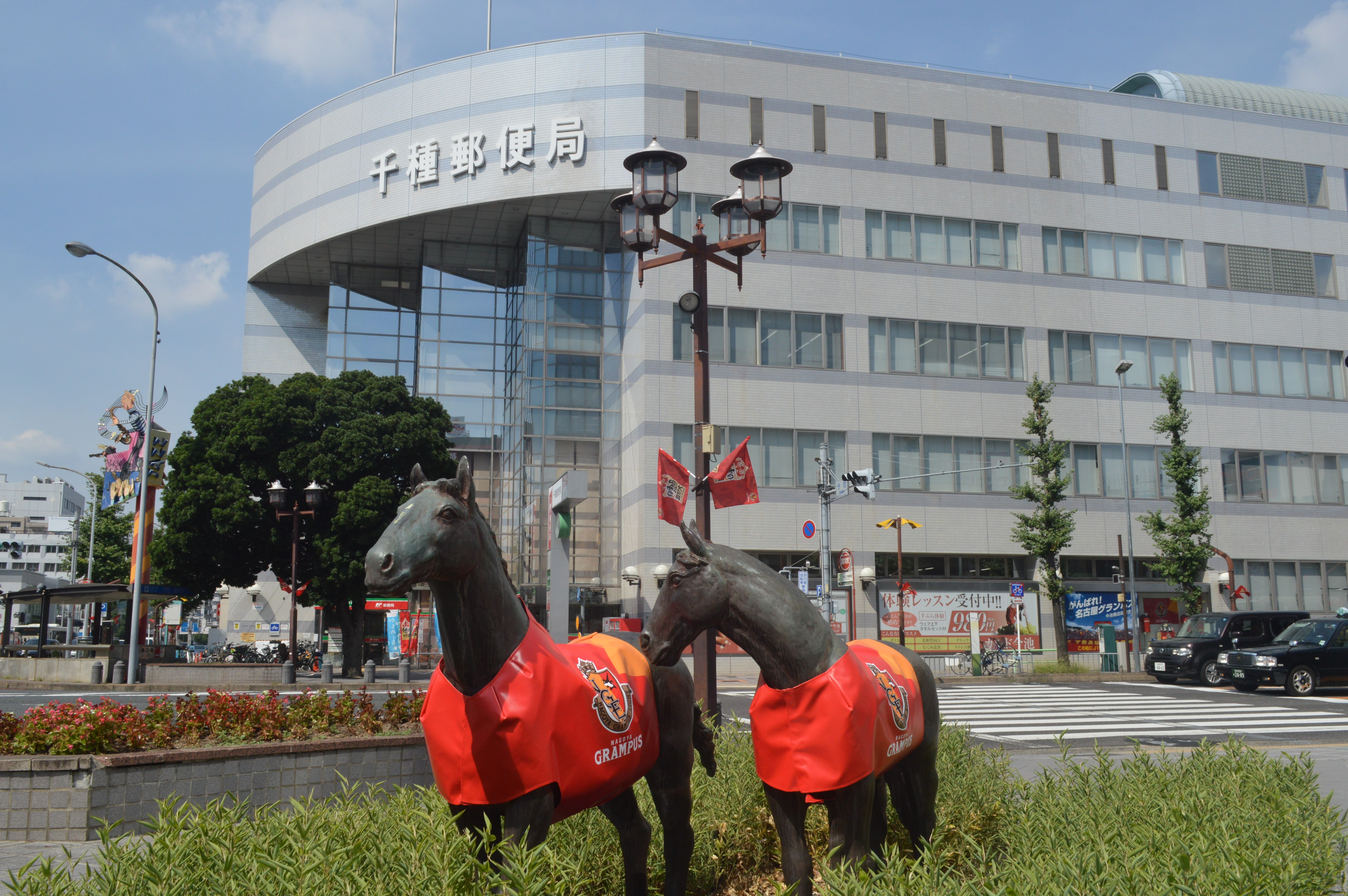 愛知県名古屋市千種区にある千種郵便局と、銅像「出合い ふれあい 親子馬」。